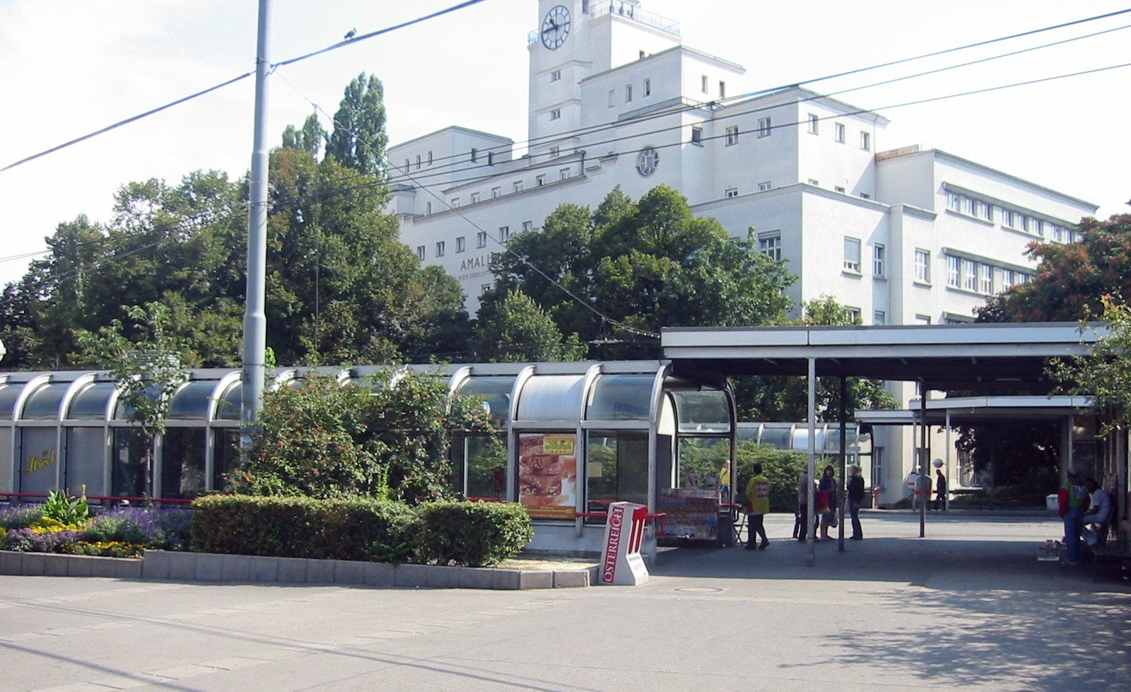 Wien, U-Bahn-Station Reumannplatz